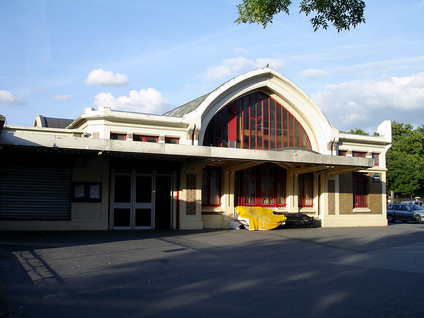 La gare de Pont-Cardinet, Paris, France.